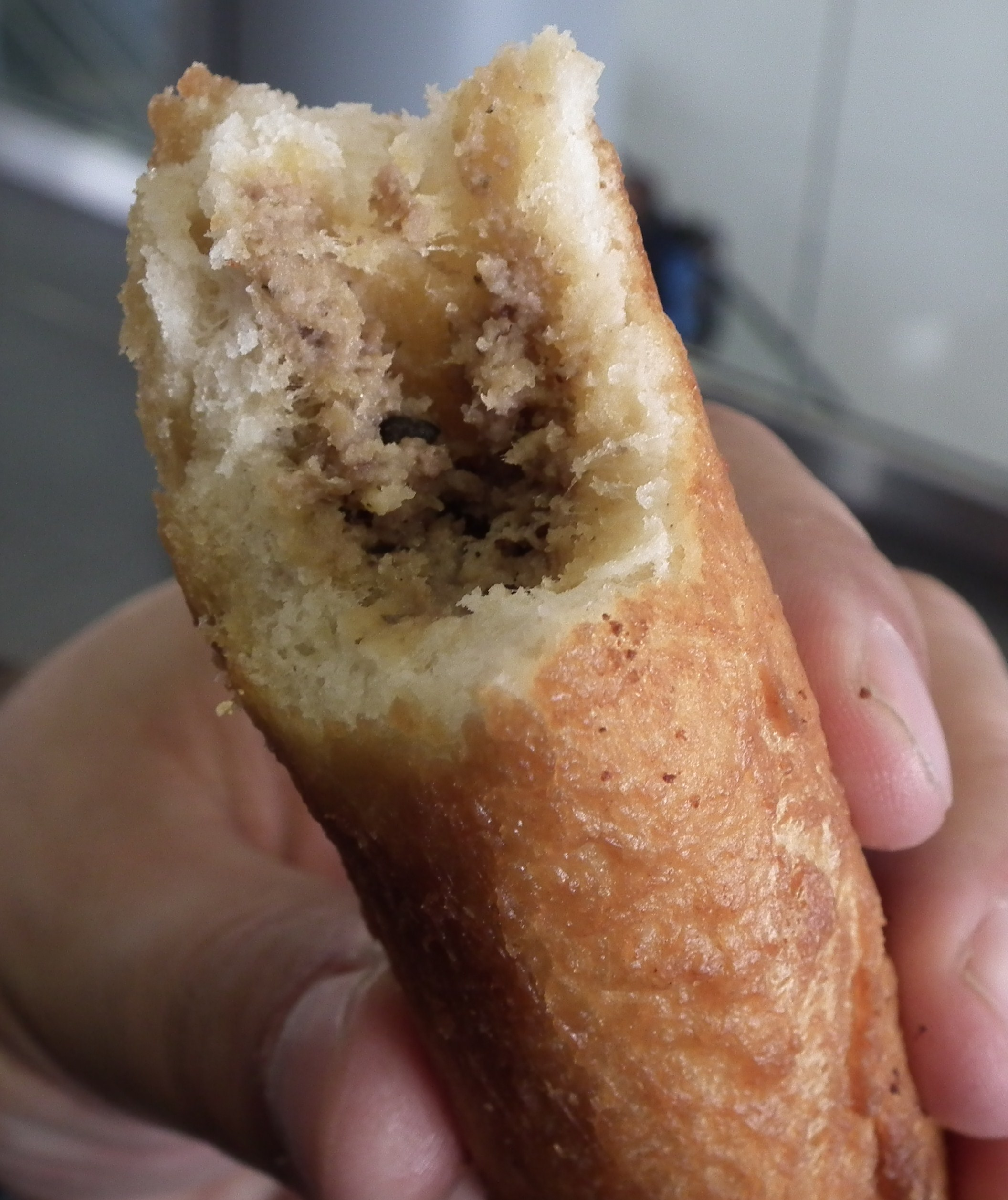 Przegryziony pasztecik szczeciński na szczecińskim dworcu głównym - widoczne mięsne nadzienie.